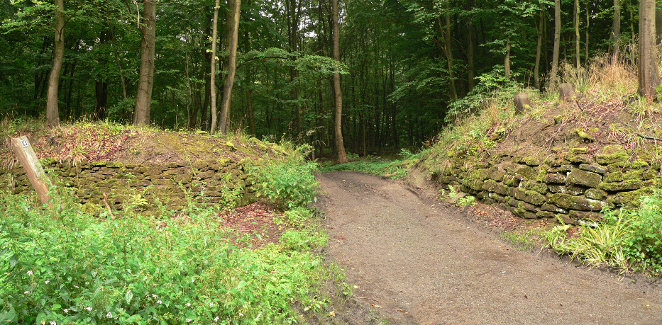 Ausgegrabenes Tor der Heisterburg